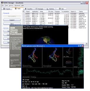 Fonte: Licensa - GNU Permission is granted to copy, distribute and/or modify this document under the terms of the GNU Free Documentation License, Version 1.2 or any later version published by the Free Software Foundation. PS: Deixem-me em msg privada caso verifiquem algum problema. Obrigado